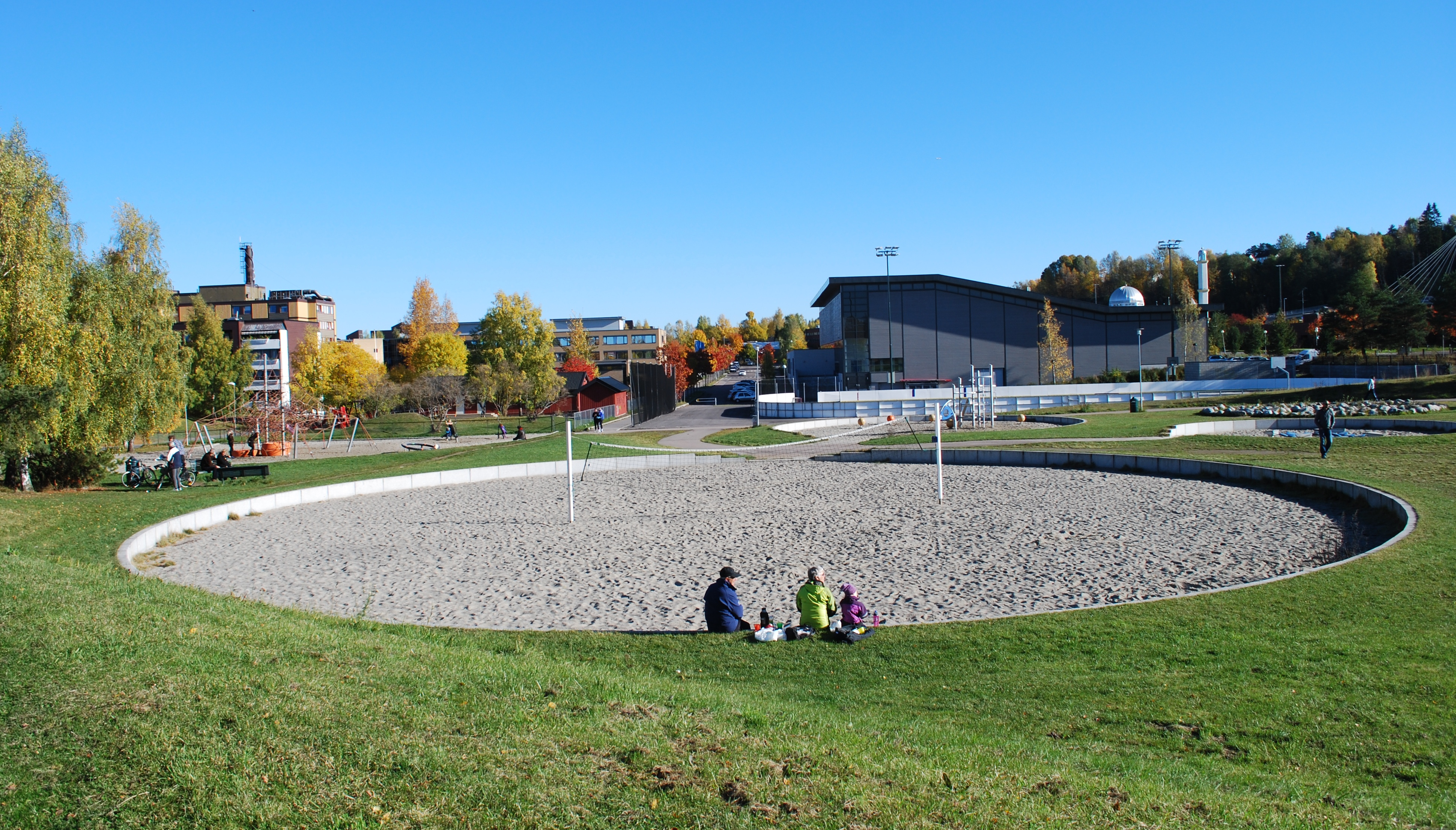 Furuset aktivitetspark, Furuset, Oslo, sandvolleyballbane. Flerbrukshallen Furuset Forum i bakgrunnen.